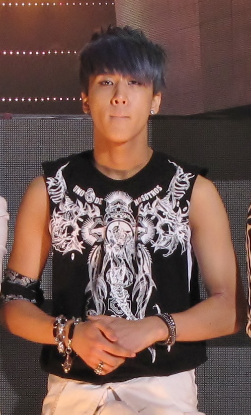 Ravi do VIXX.